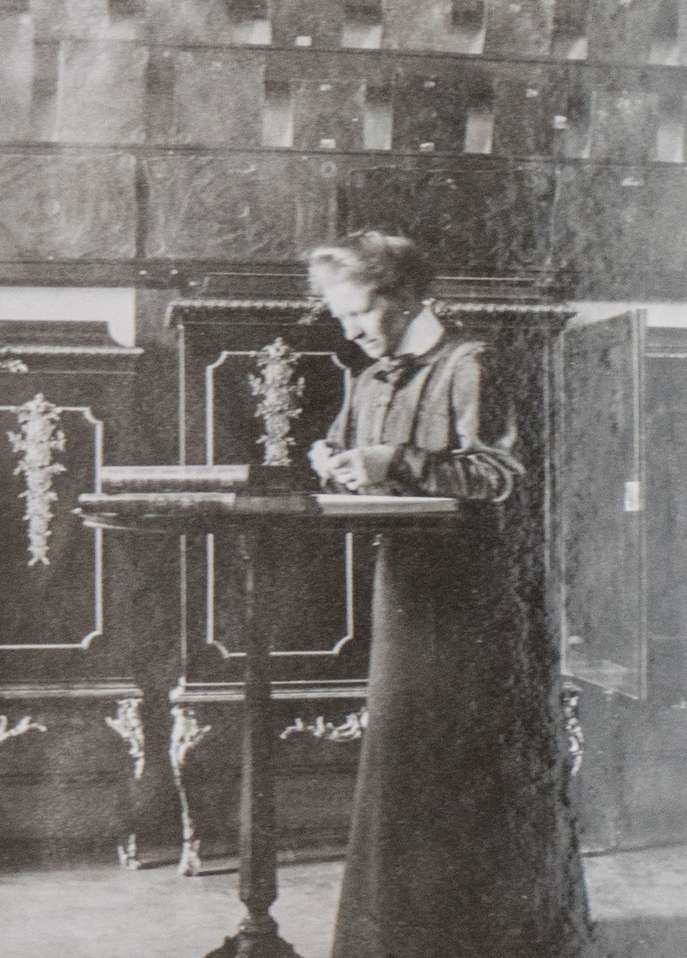 "Amanuensen fru Rosa Norström Myntkabinettet" A73:77